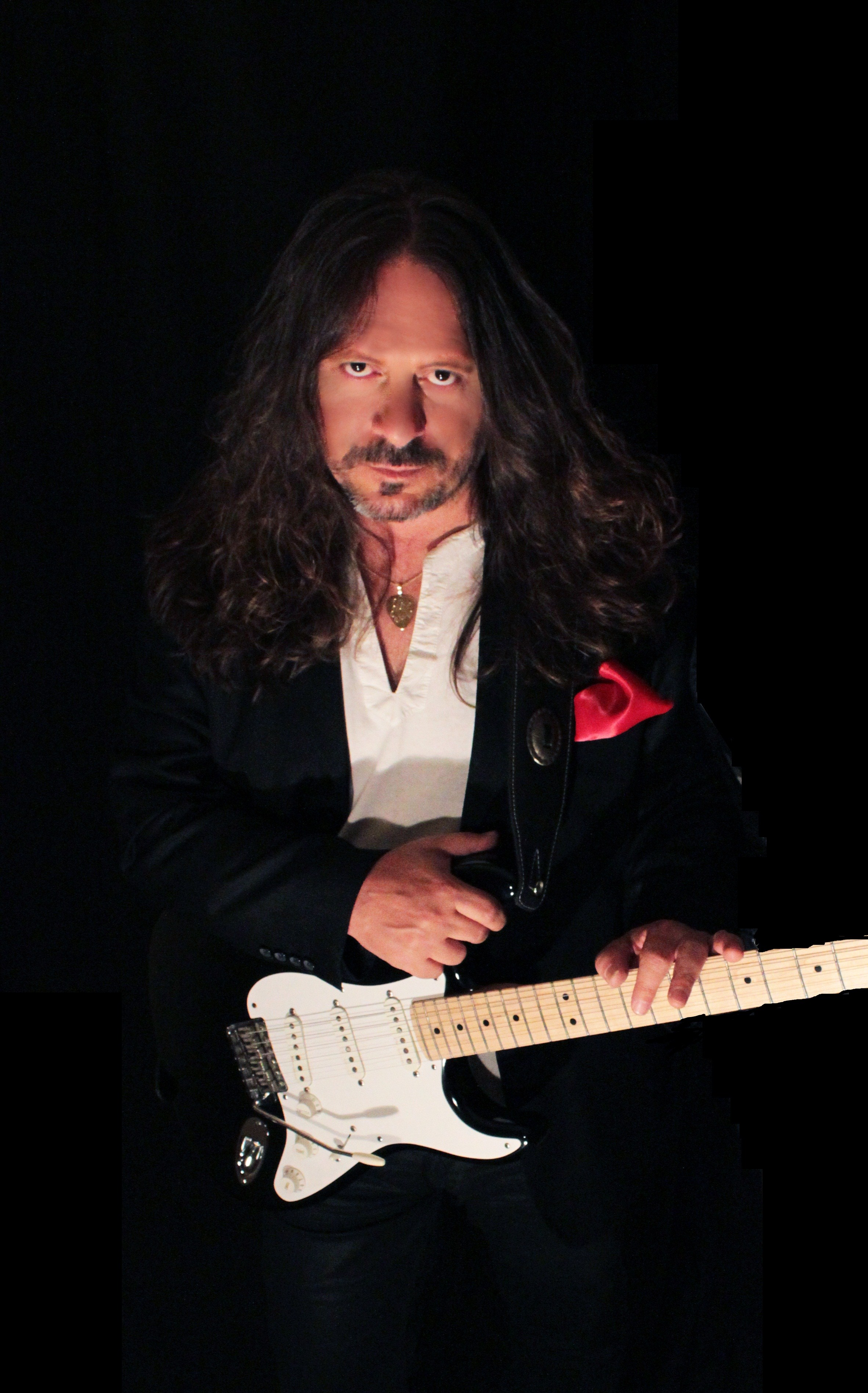 Μιτζέλος Αντώνης πριν από την συναυλία του στους Δελφούς.